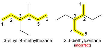 IUPAC naming (alkane)